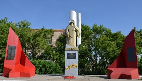 Памятник войнам-красноармейцам участникам ВОВ